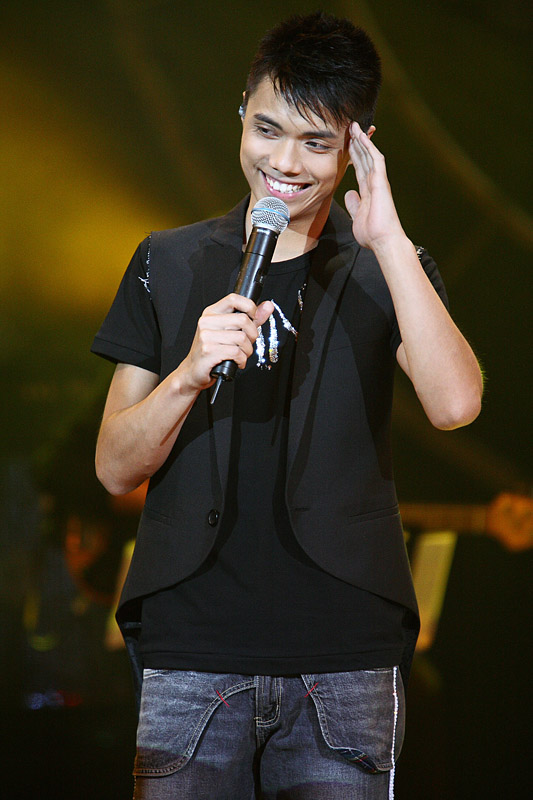 Hins Cheung